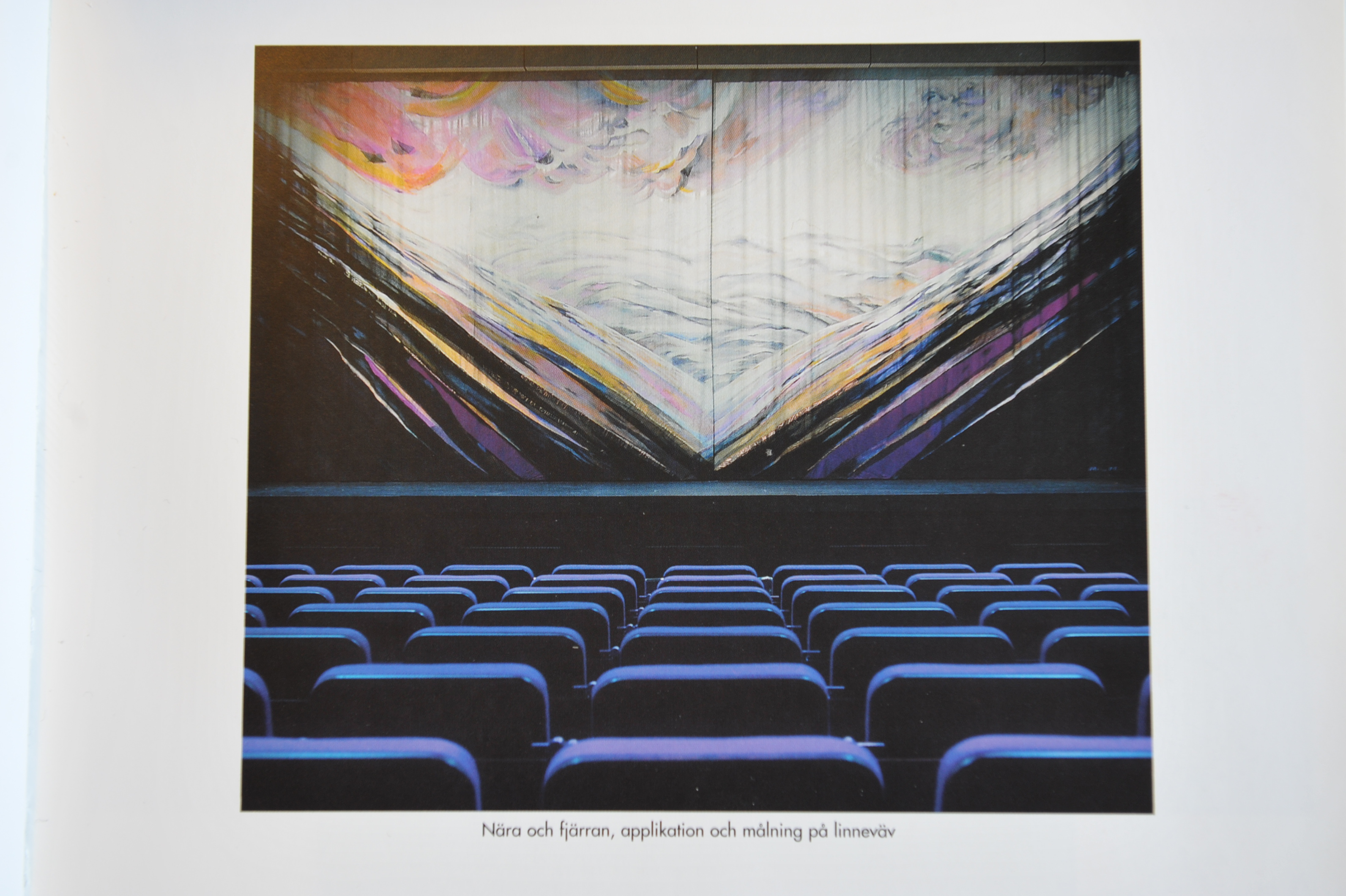 Ridå i Ryhov Länssjukhus stora aula Jönköping 1987 Mary Moeschlin